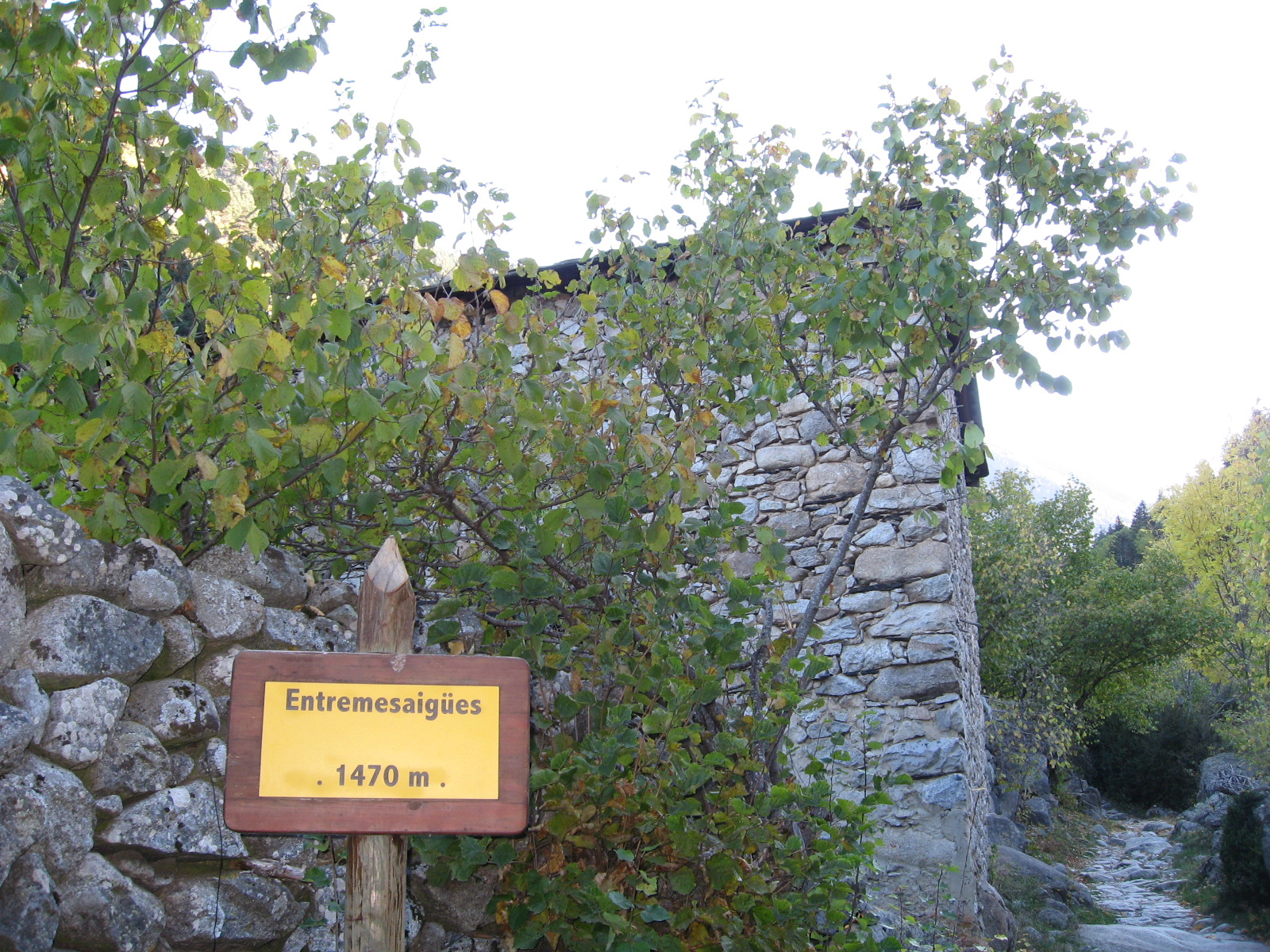 Entremesaigües